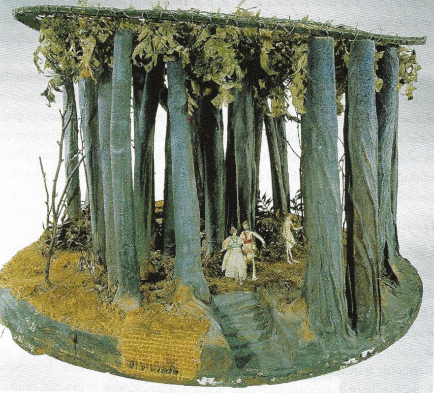 Modèle conçu par Karl Walser pour la scène tournante d'Un songe d'une nuit d'été, réalisation de Gustav Knina. Neues Theater, 31 janvier 1905